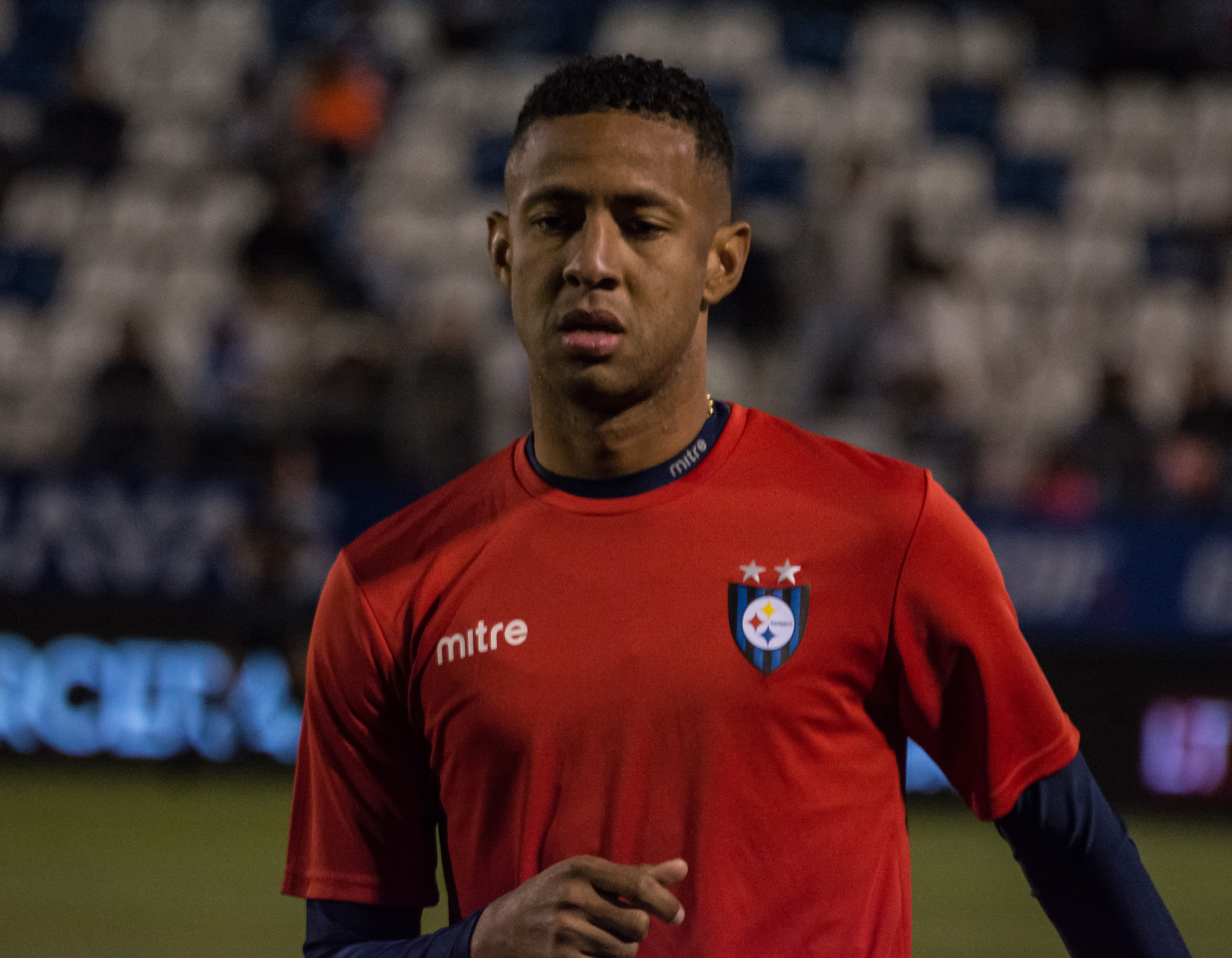 Universidad Católica v Huachipato, Estadio San Carlos de Apoquindo, Las Condes, Santiago, Chile.